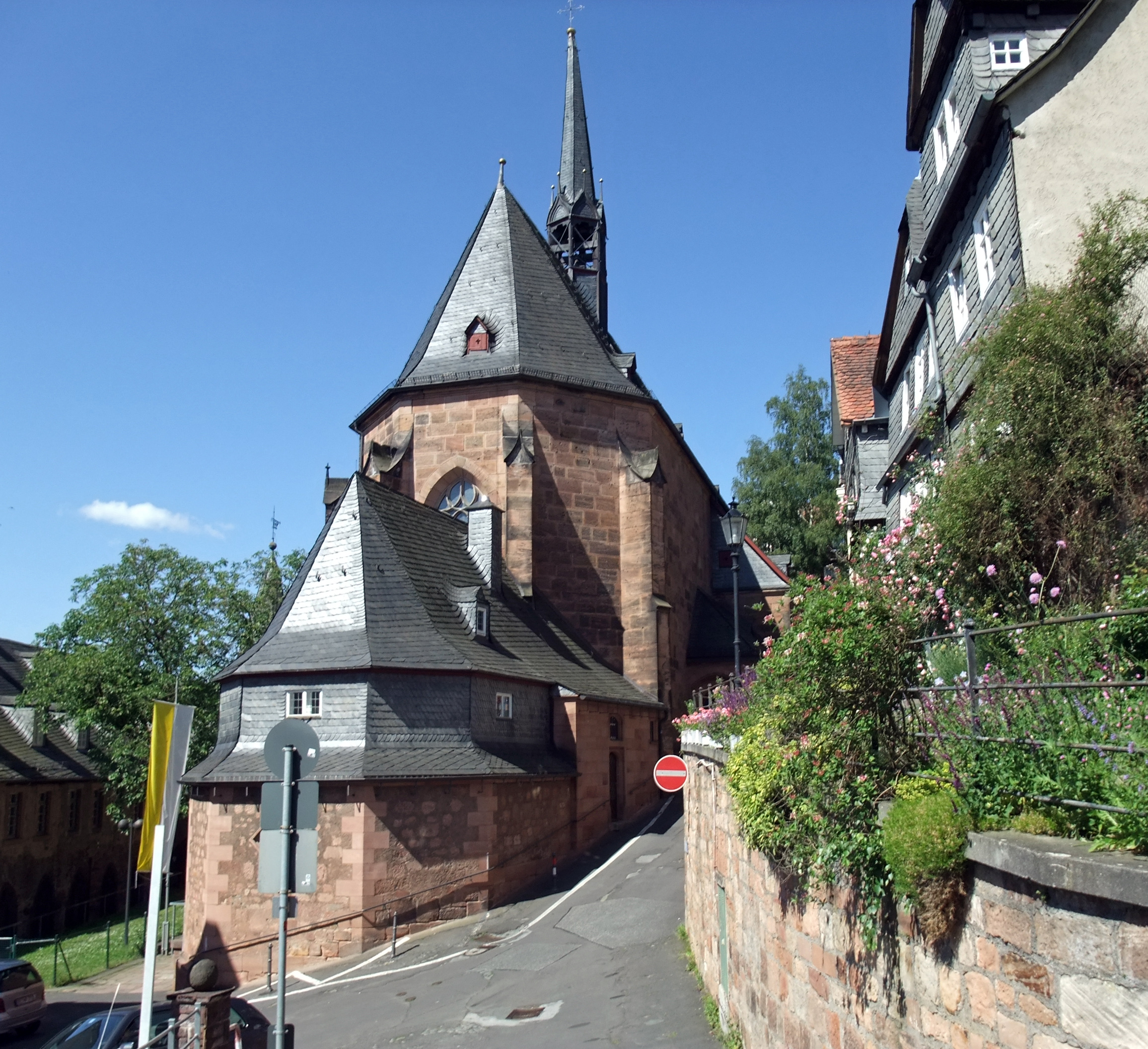 Kugelkirche in Marburg aus Richtung Osten